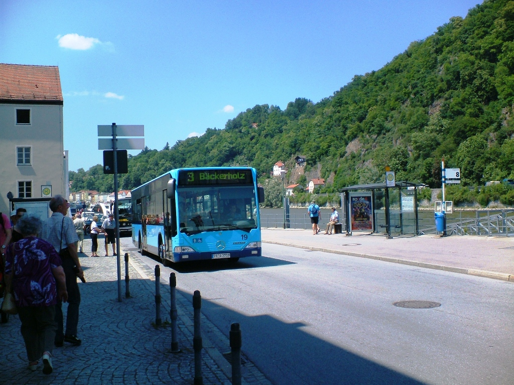 Mercedes Citaro - Passau